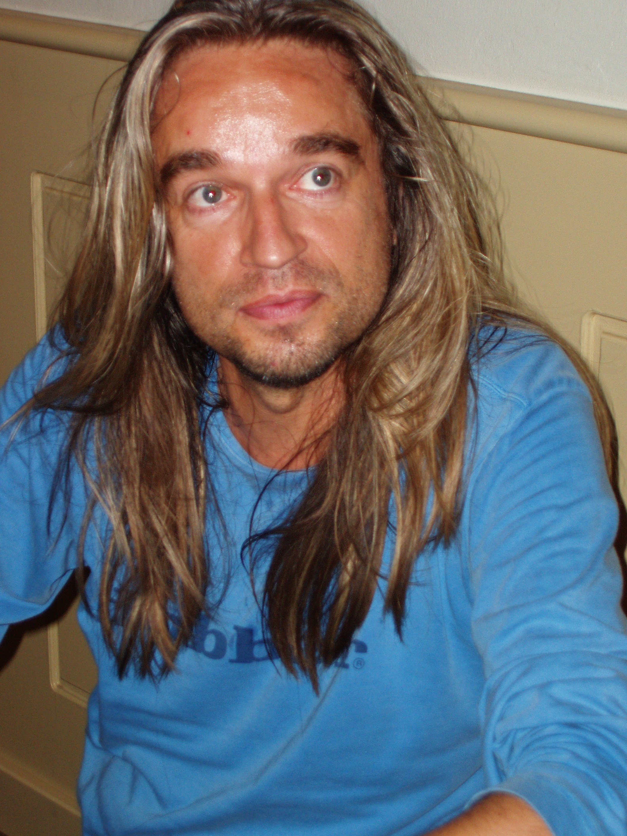 Jan Vayne, pseudoniem van Jan Veenje, (Zuidwolde, 9 juni 1966) is een Nederlandse pianist. -- Foto is gemaakt op Open Monumentendag 2005 tijdens een optreden van Jan Vayne.